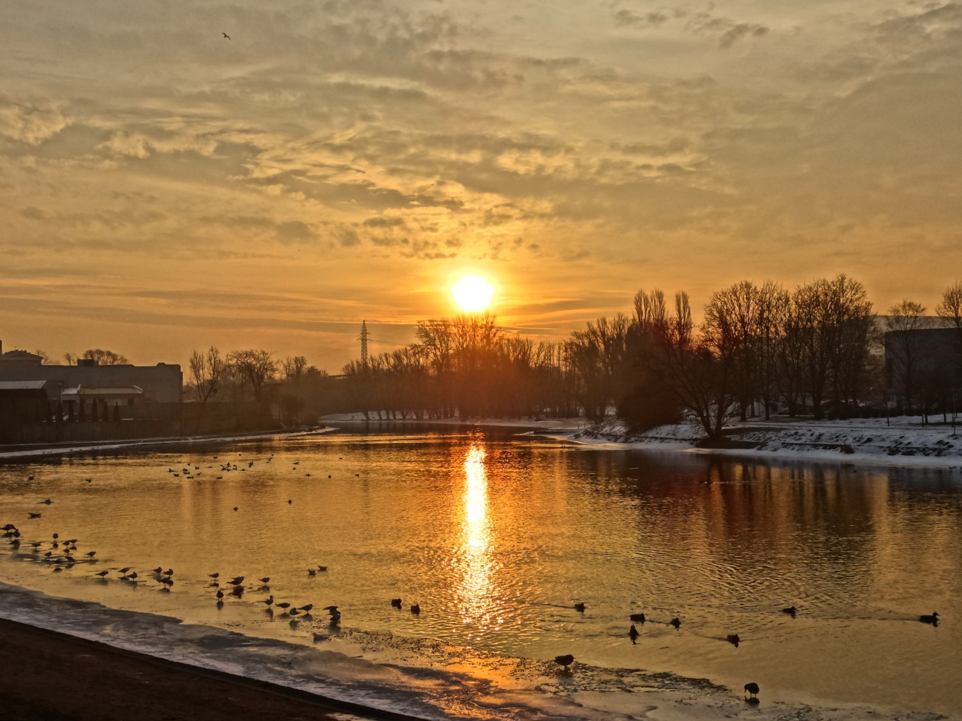 Zakole Brdy w Bydgoszczy koło hali widowiskowo-sportowej "Łuczniczka" w Bydgoszczy